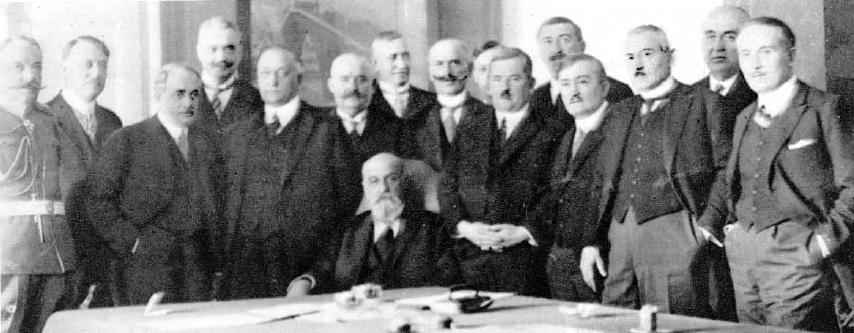 Jugoslovanska vlada 1928.